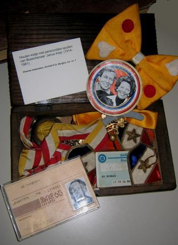 Zelfgemaakt beeld, vrij voor gebruik.